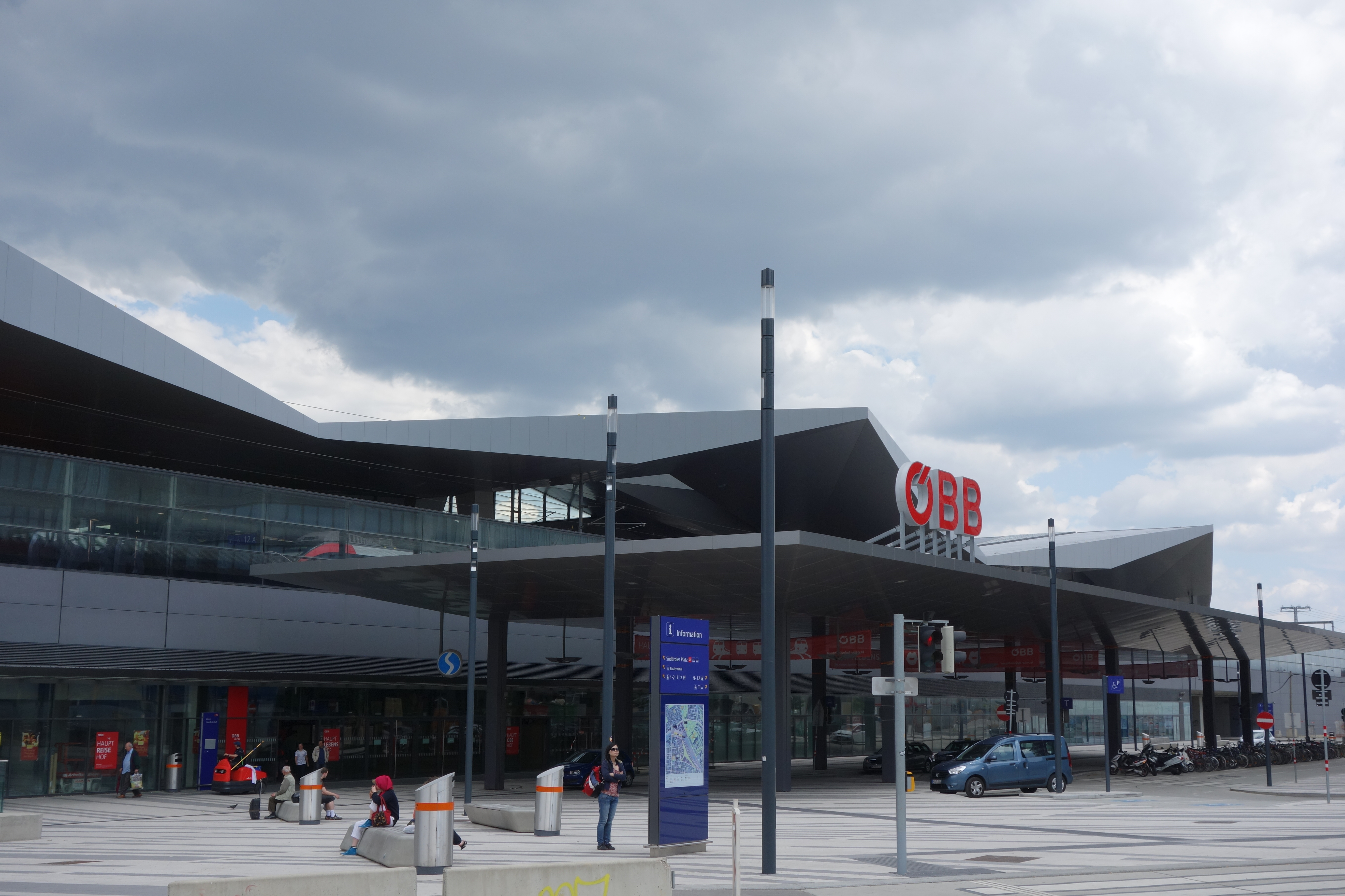 Der Vorplatz Süd des Wiener Hauptbahnhofs im Juni 2014.